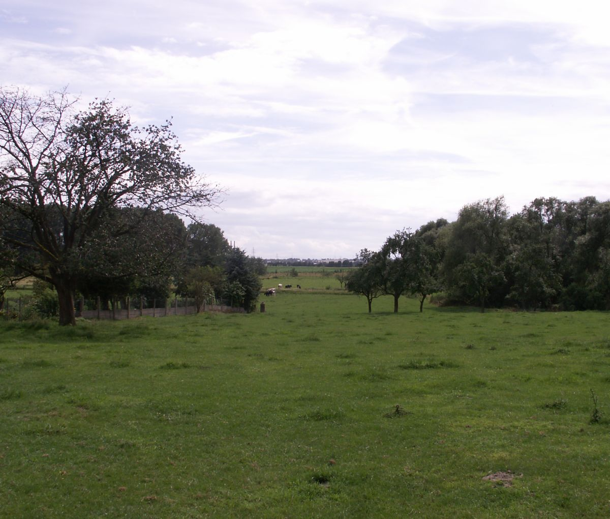 Landschafts-Motive aus dem Heinsberger Land (bei Wassenberg-Luchtenberg)